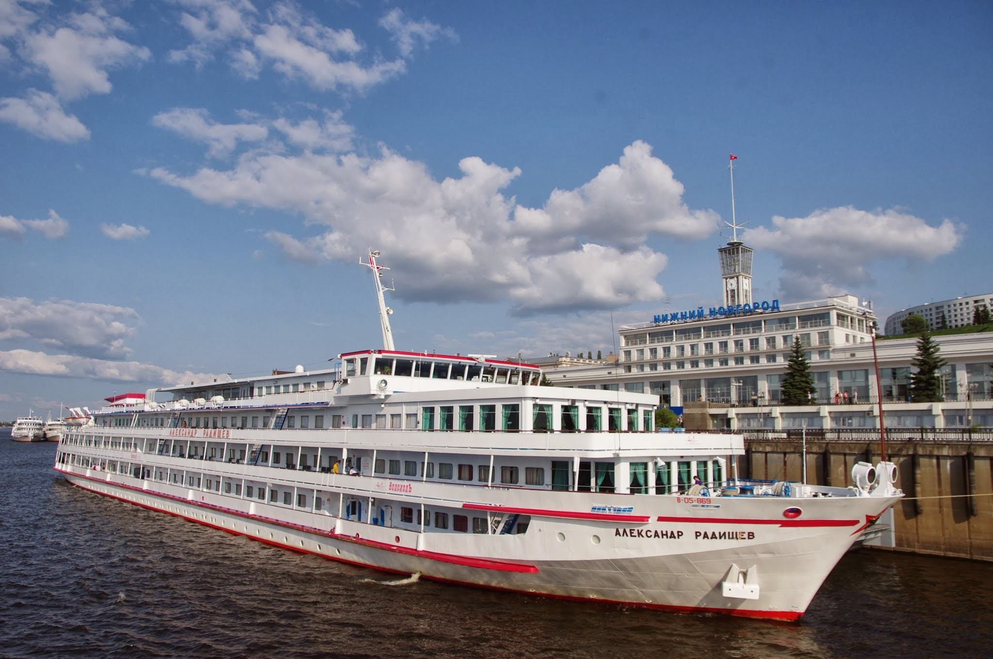 Речной круизный теплоход «Александр Радищев» у причала в Нижнем Новгороде